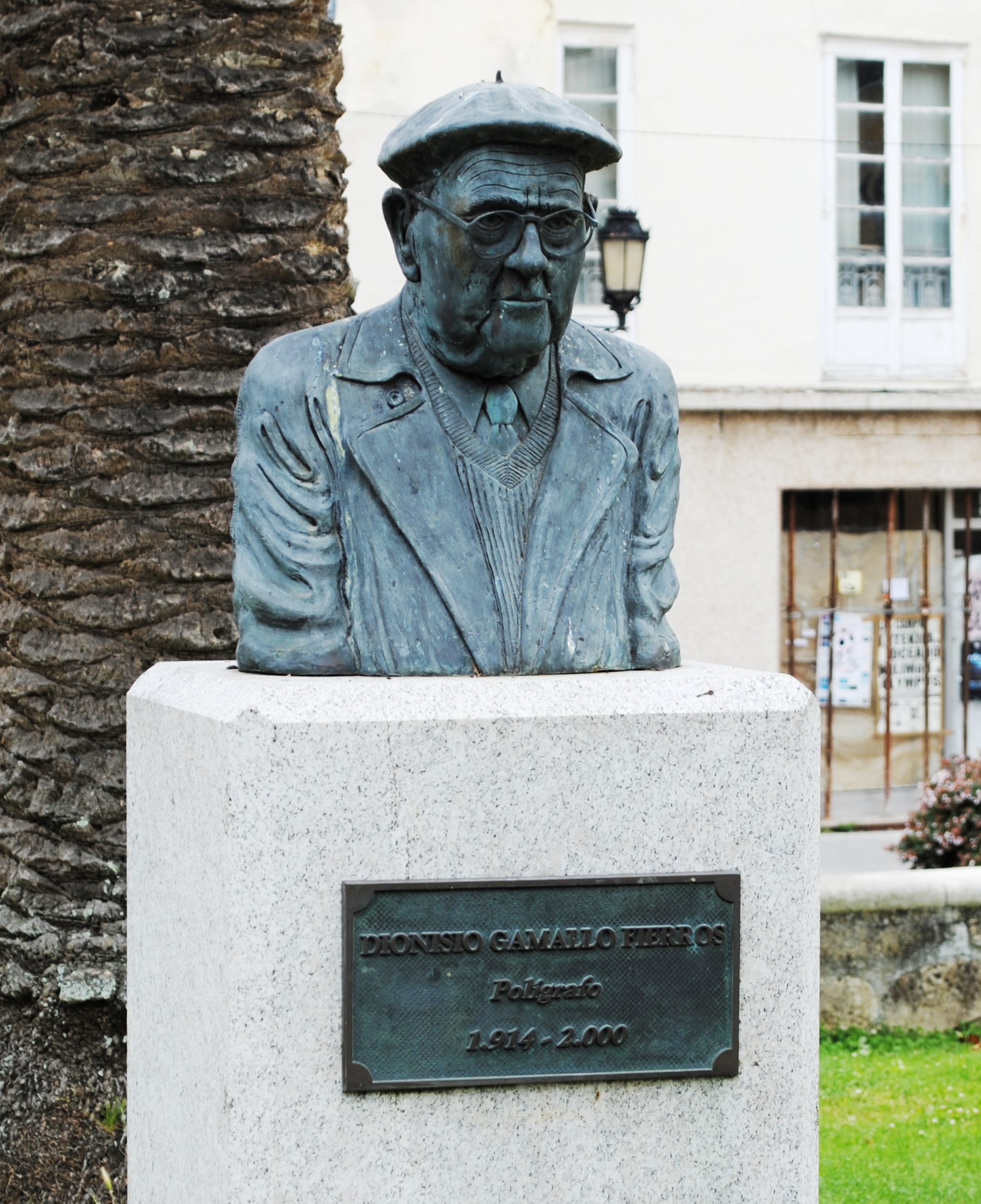 Véxase o título e as categorías